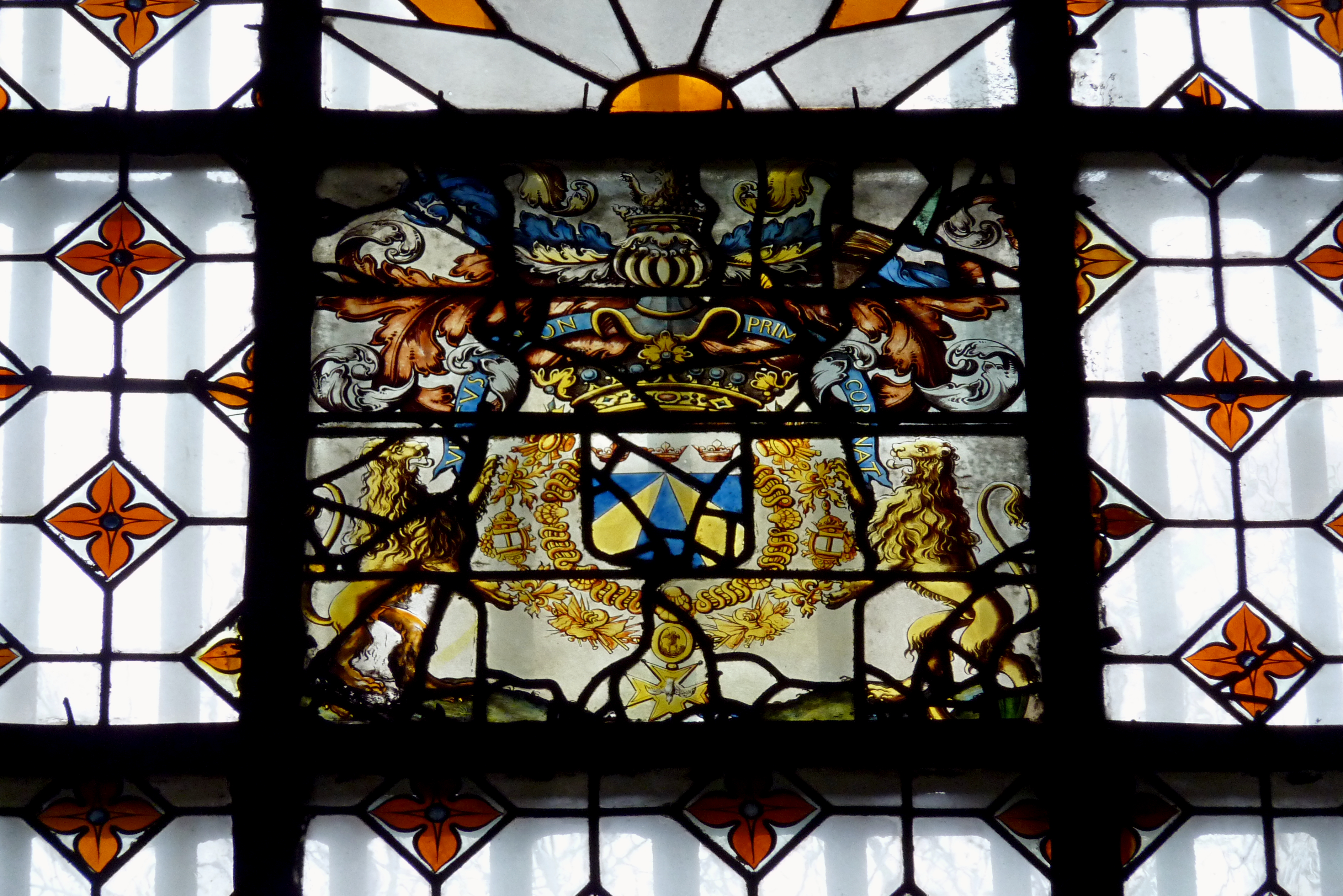 Katholische Kirche St-Paul-St-Louis im 4. Arrondissement in Paris (Île-de-France/Frankreich), Bleiglasfenster